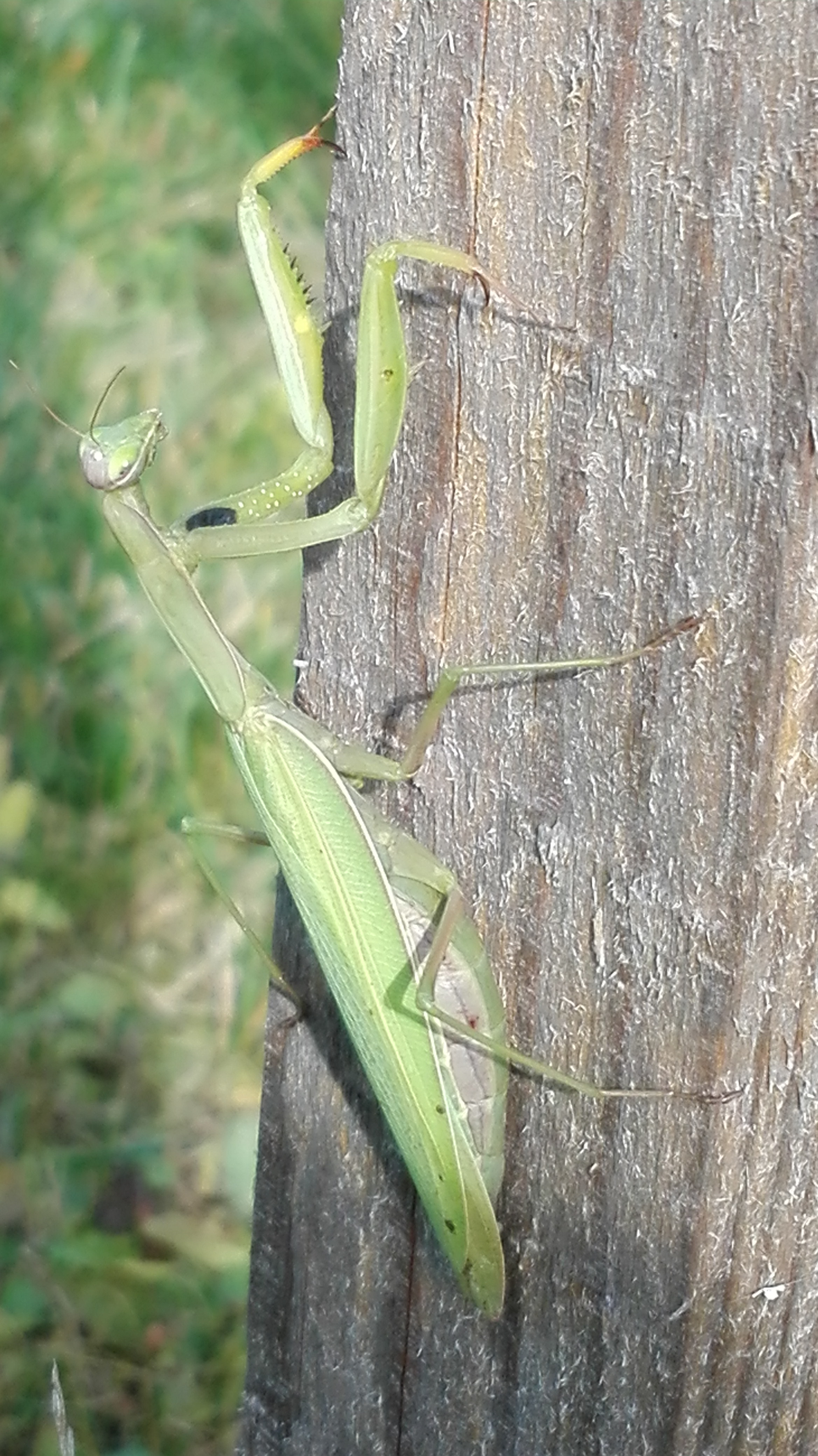 Mantis religios (Imádkozó sáska peterakás előtt)